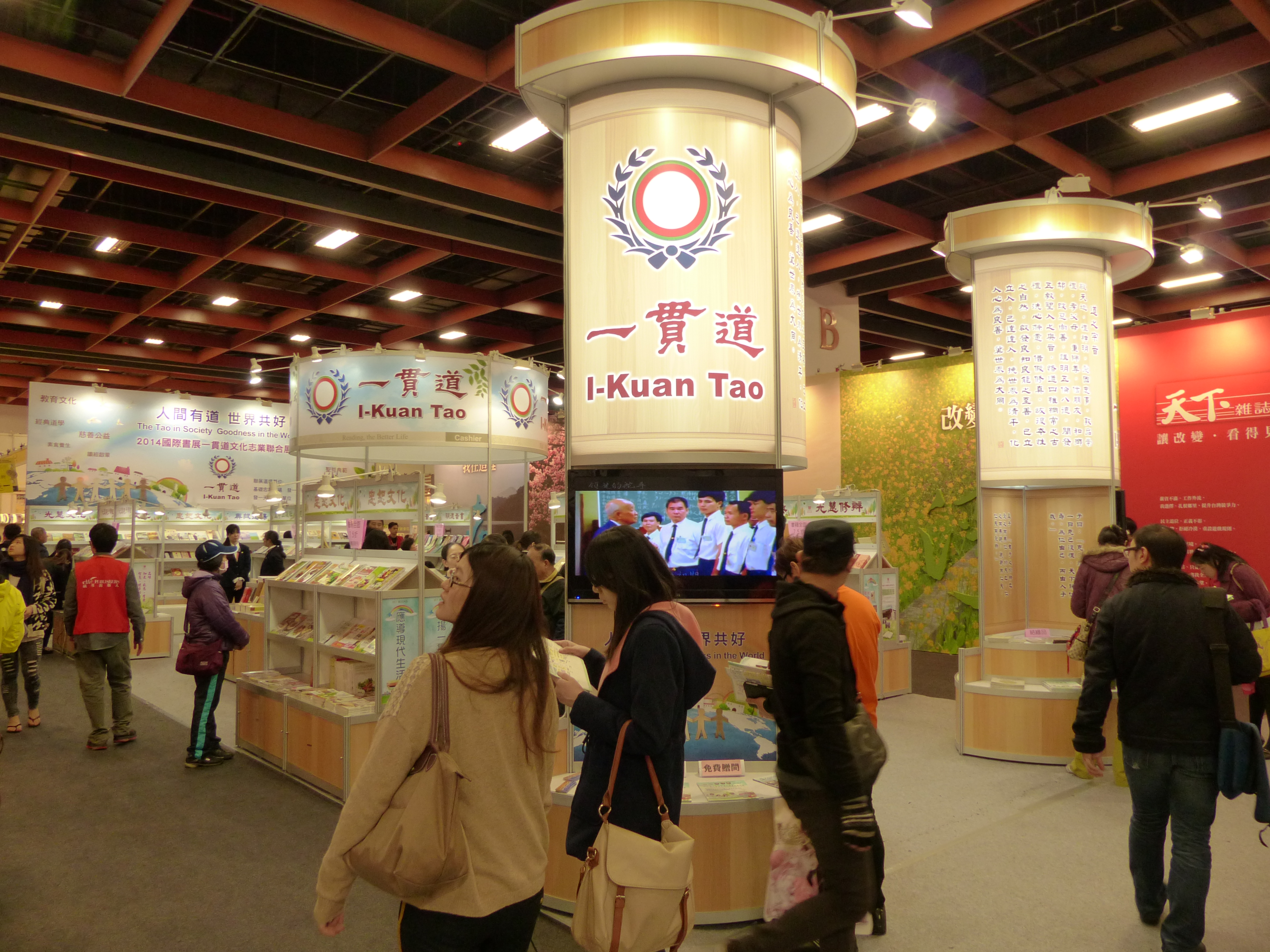 第22屆臺北國際書展，世貿一館國際書區中華民國一貫道總會攤位。